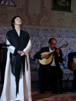 Misia